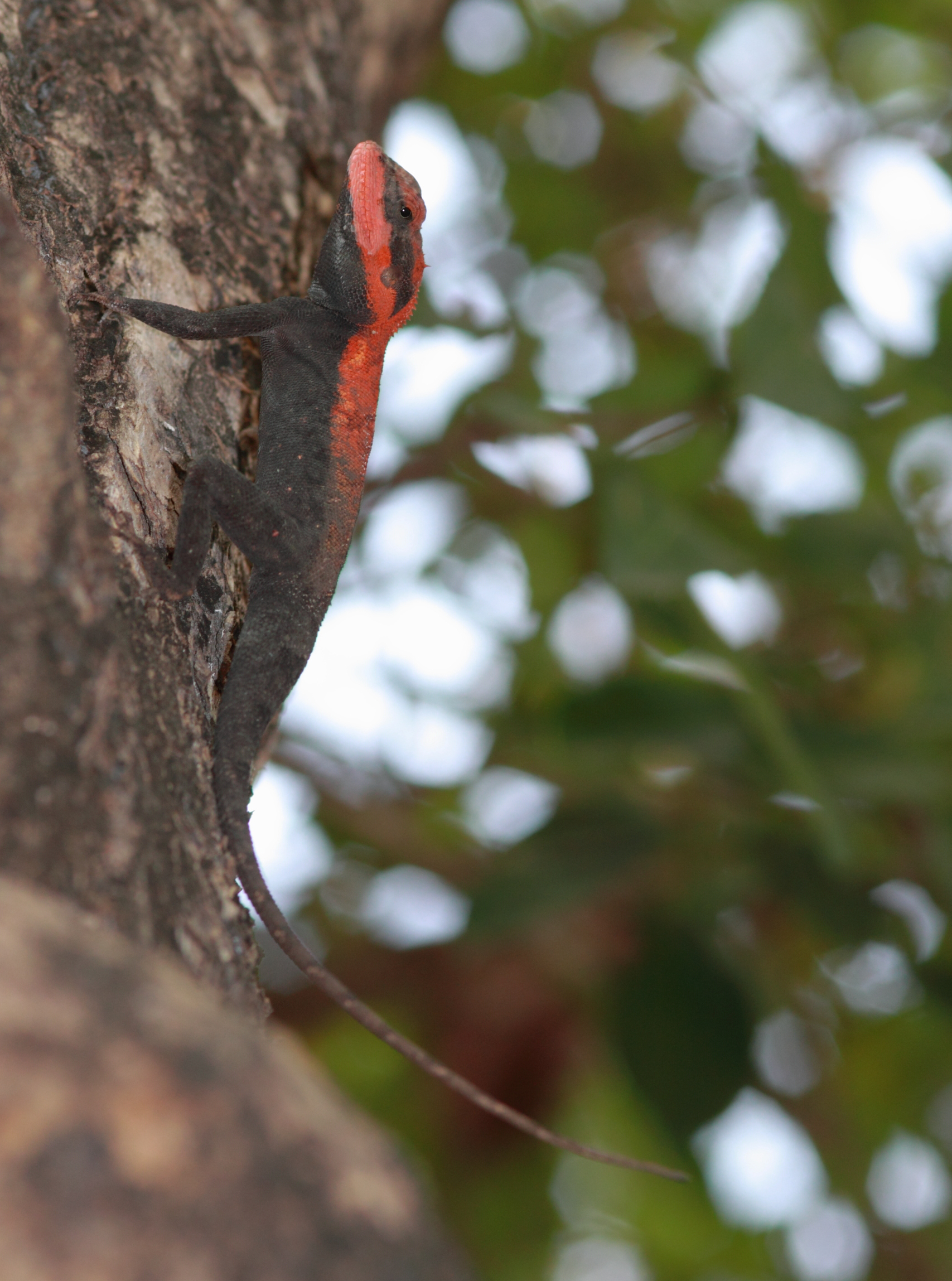 Rock Agama Psammophilus dorsalis